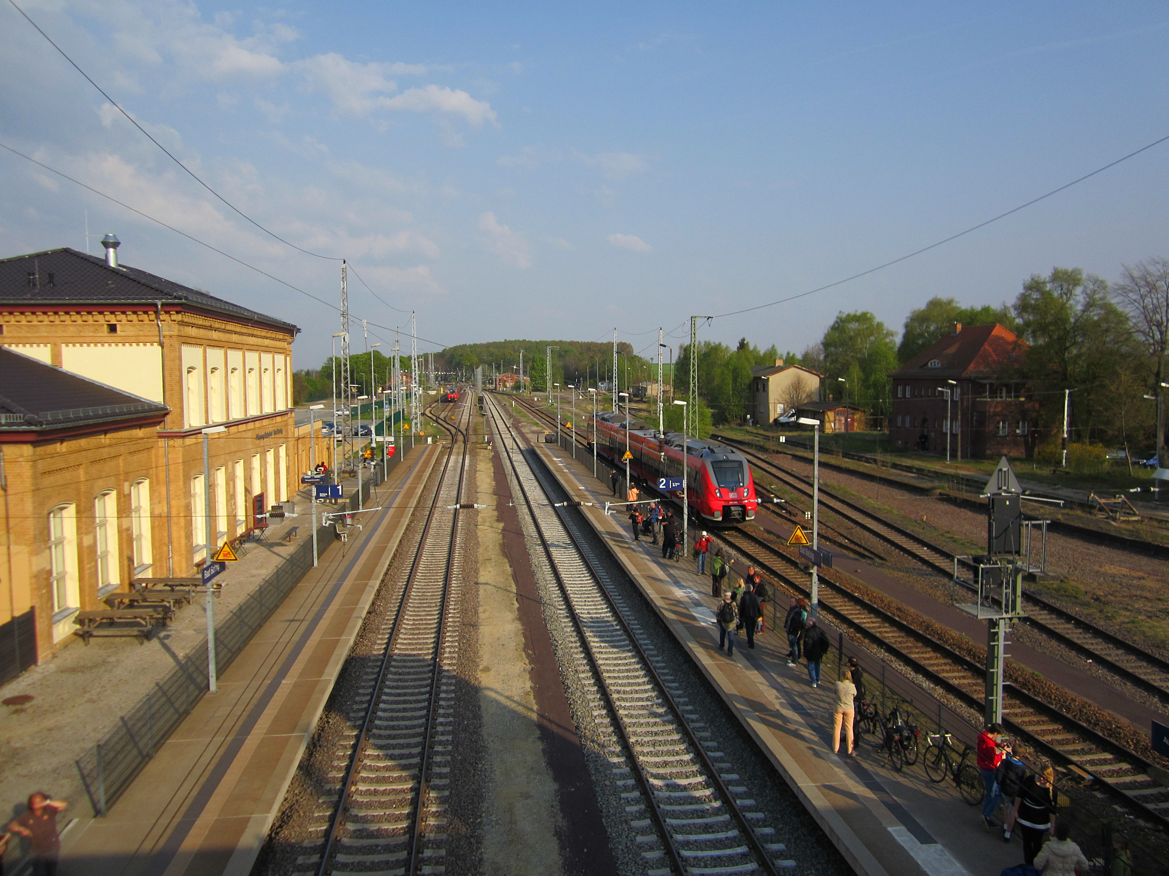 Bahnhof Bad Belzig